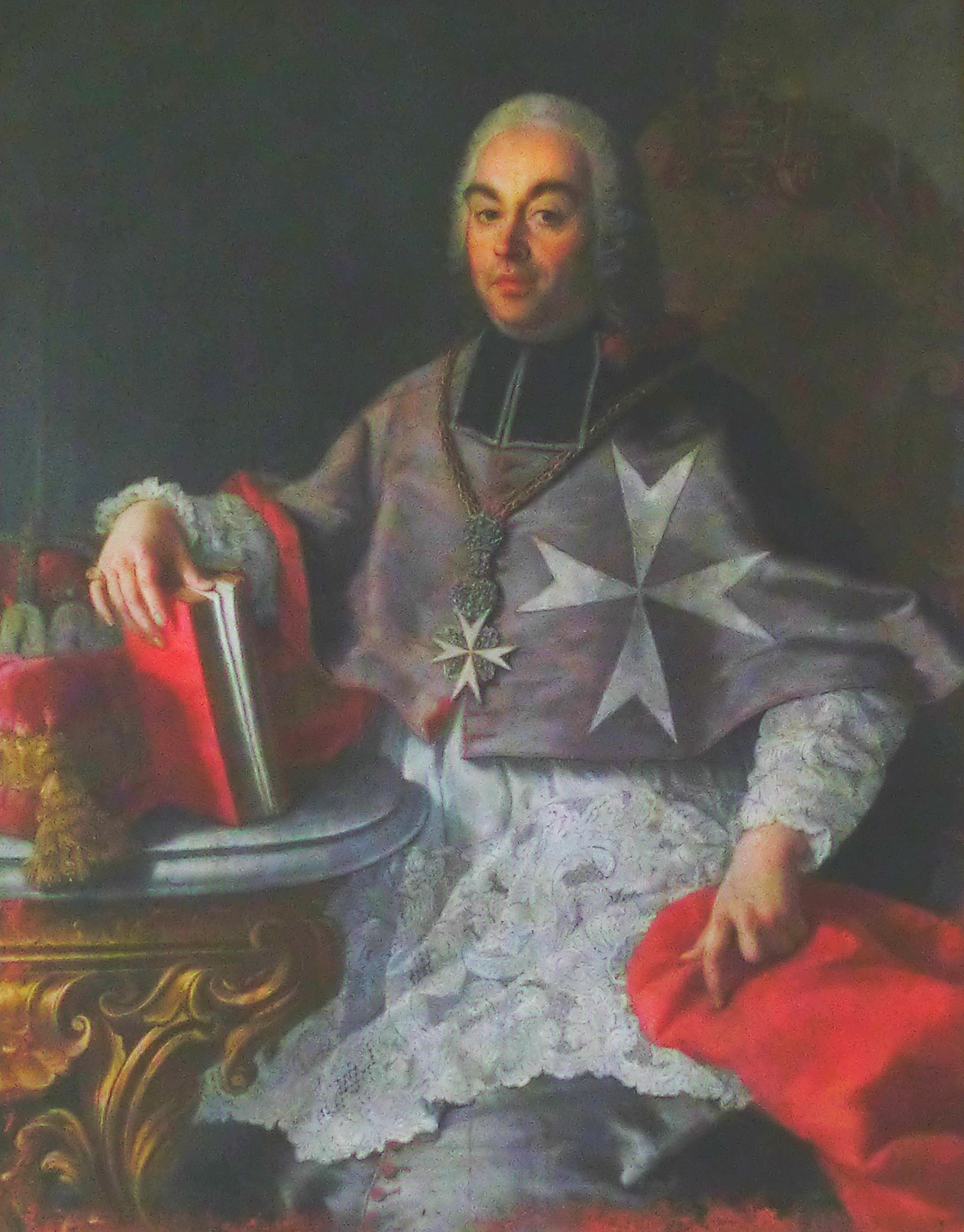 Mořic Adolf Sachsen-Zeits, 5. litoměřický biskup